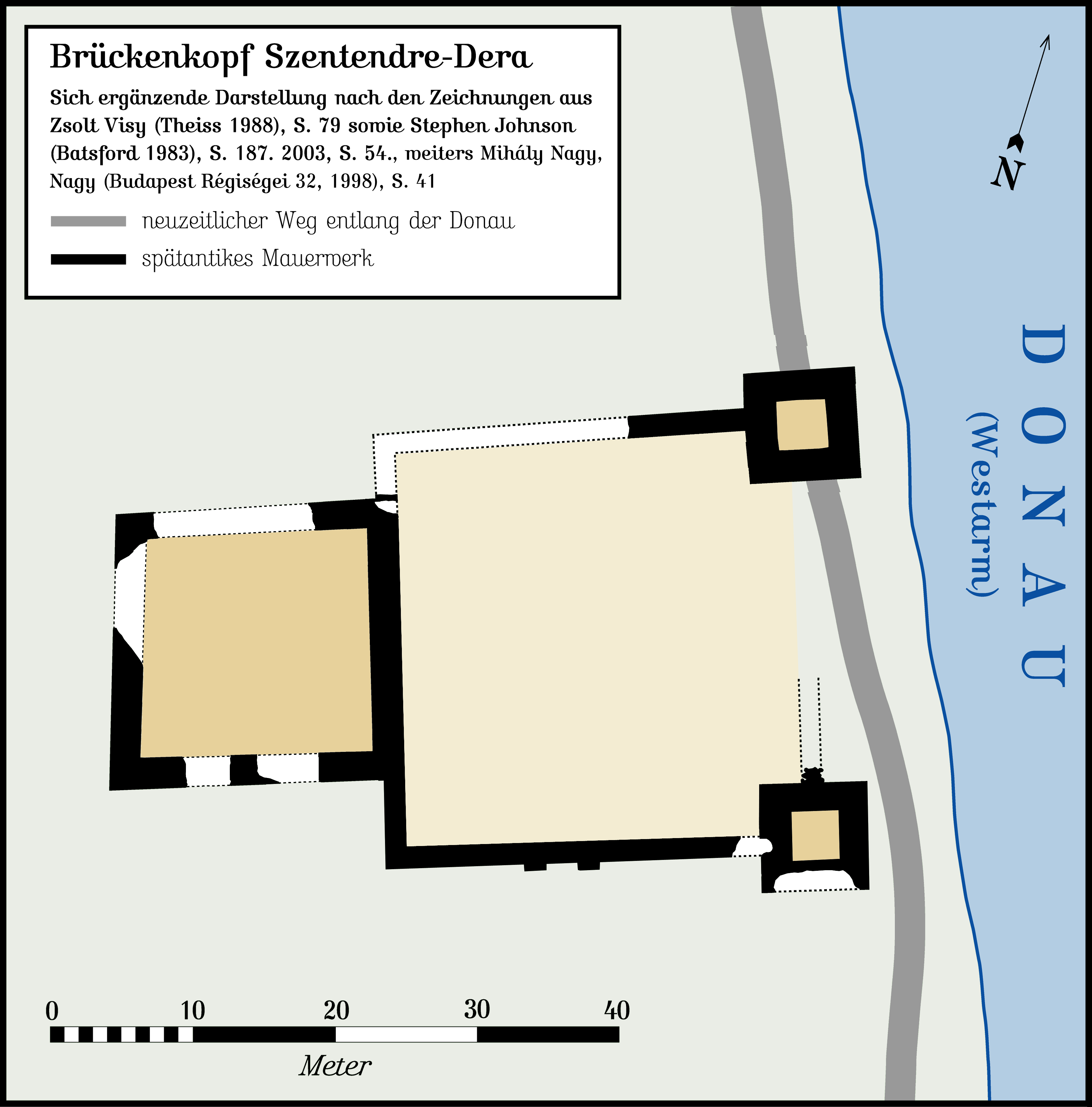 Grundriss des spätantiken Brückenkopfkastells Szentendre-Dera. Genaue Quellenangabe sh. Angaben im Bild. Gezeichnet in FreeHand MX für Macintosh; abgespeichert in Adobe Photoshop CS. Dies ist die Originalversion der Zeichnung.